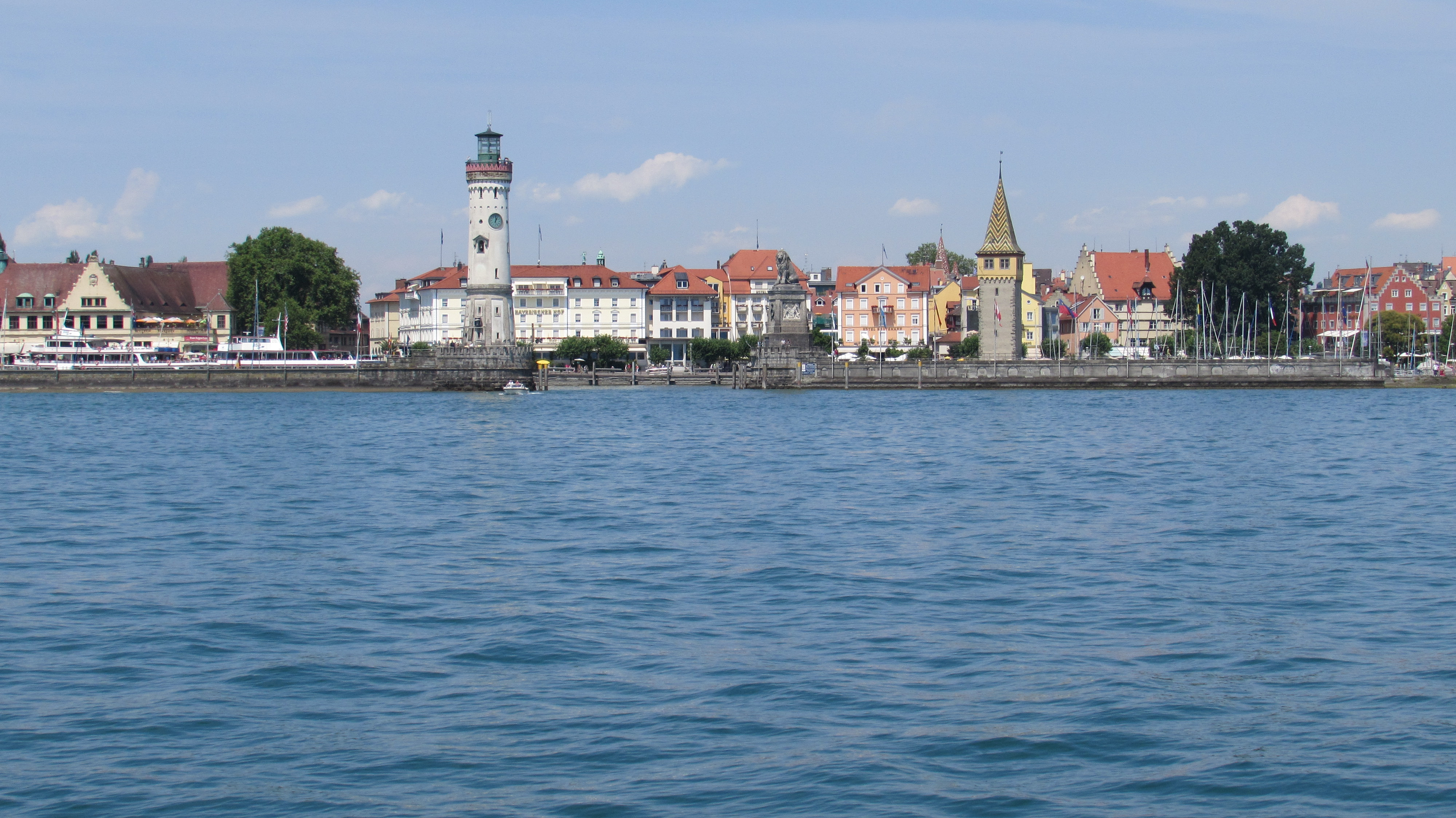 Lindau Vom Bodensee 2015